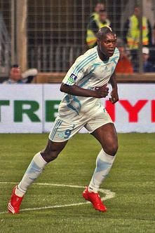 Olympique de Marseille - Girondins de Bordeaux Djibril Cissé 2007-2008